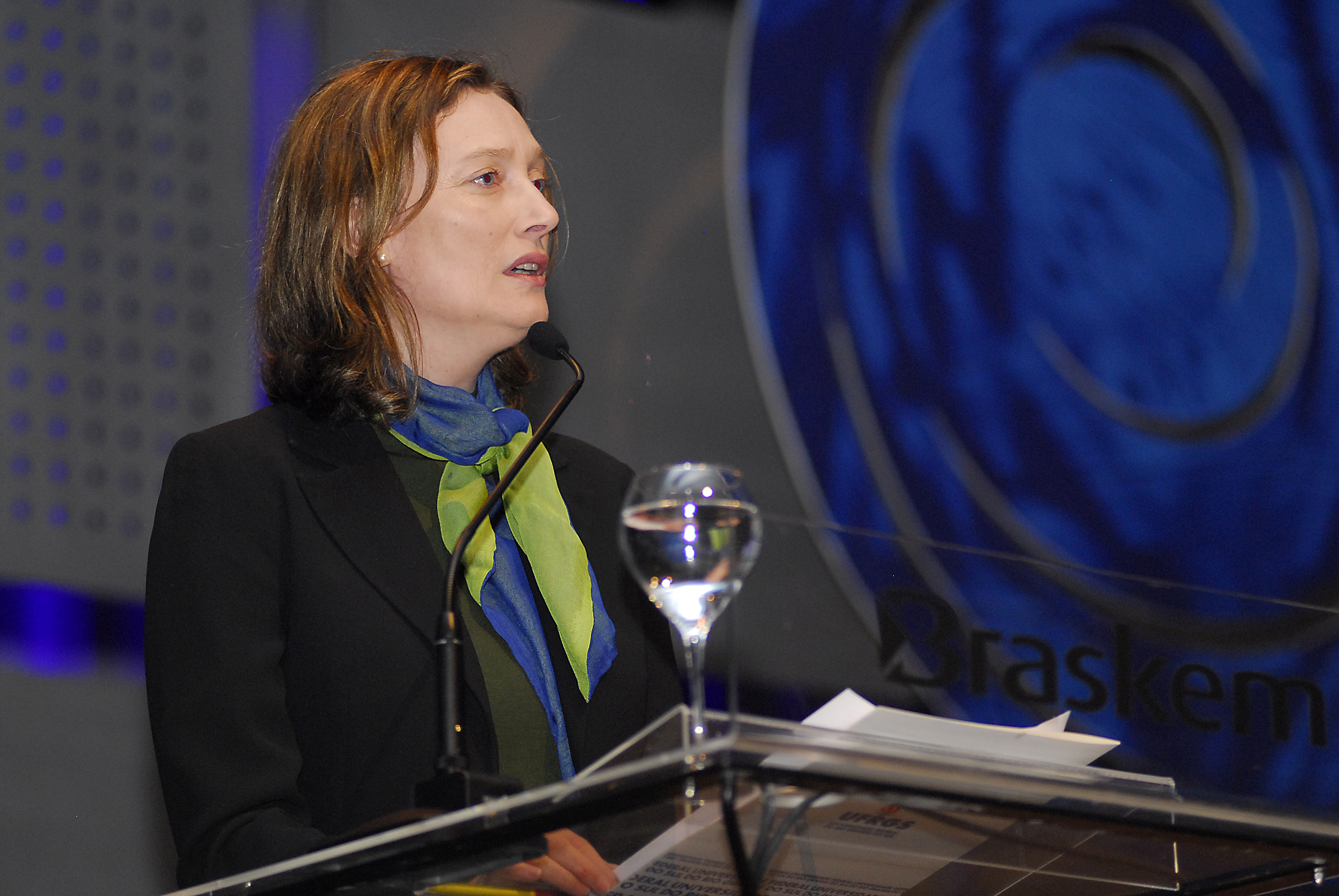 Maria do Rosário, Secretaria de Direitos Humanos da Presidência da República do Brasil